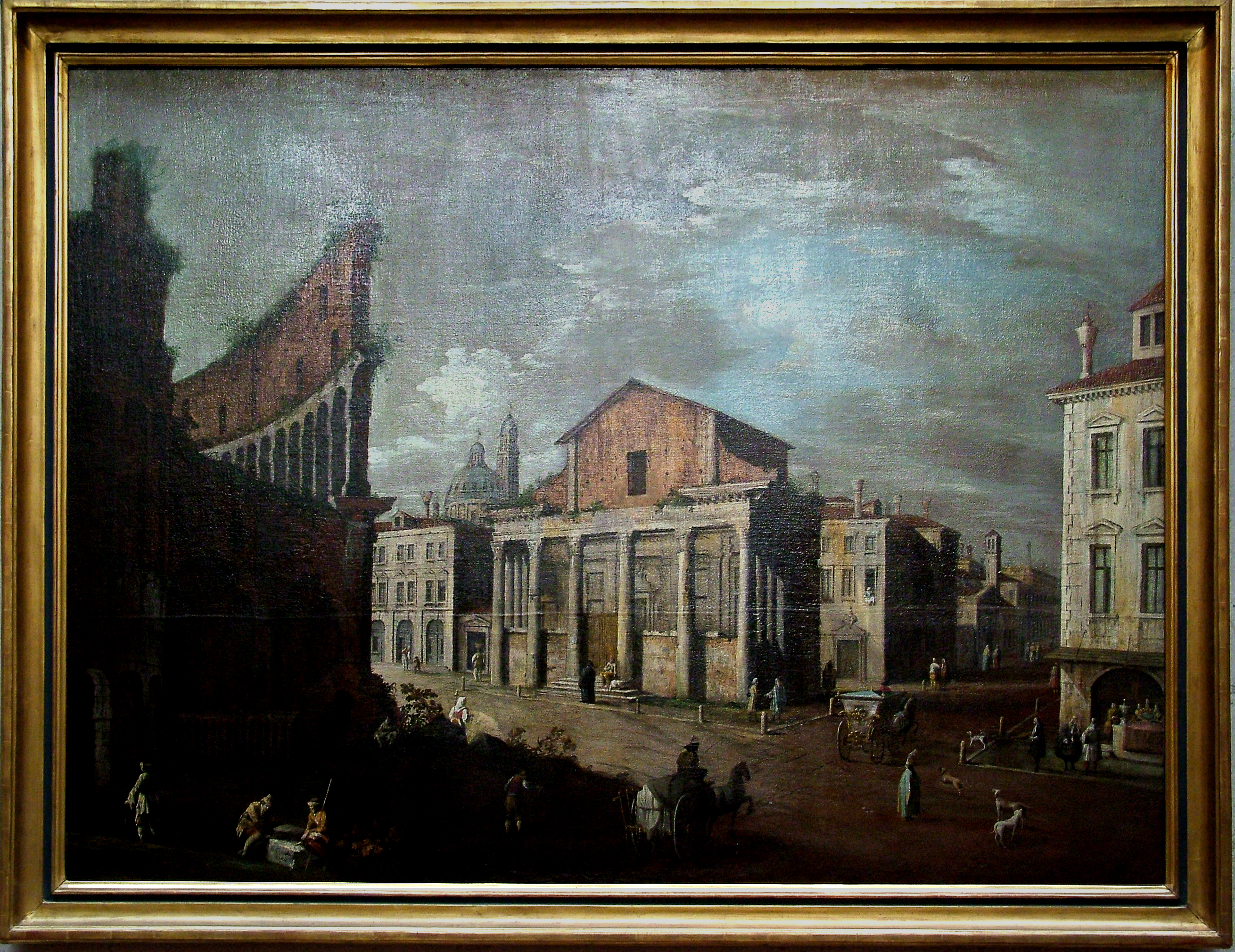 Canaletto: Róma, Pl. Campidoglio (Szépművészeti Múzeum, Budapest)